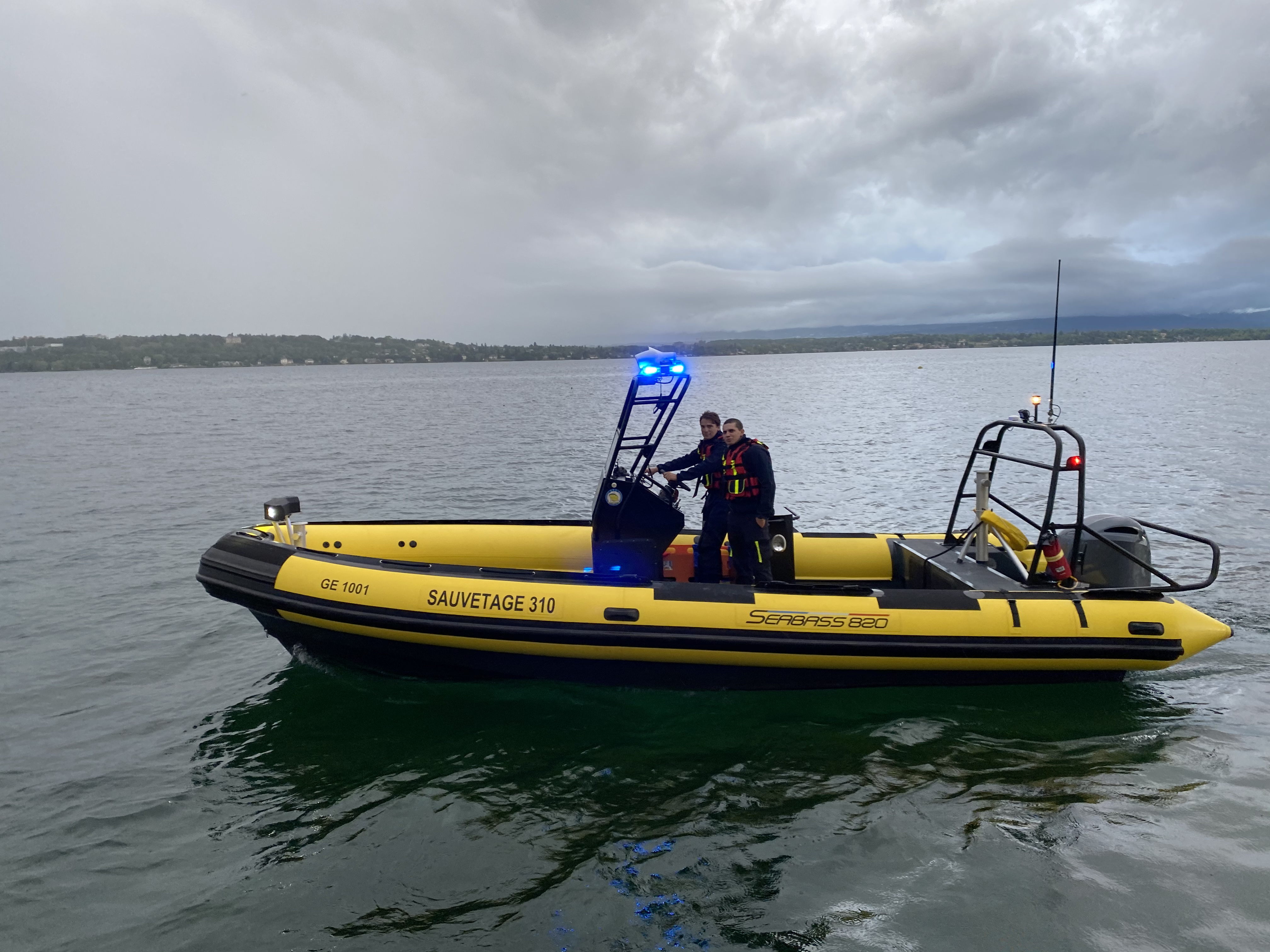 Le Zéphyr, Lemano 310 avec les feux bleus